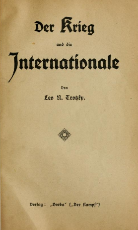 Trotsky - Der Krieg und die Internationale (cover, 1914)